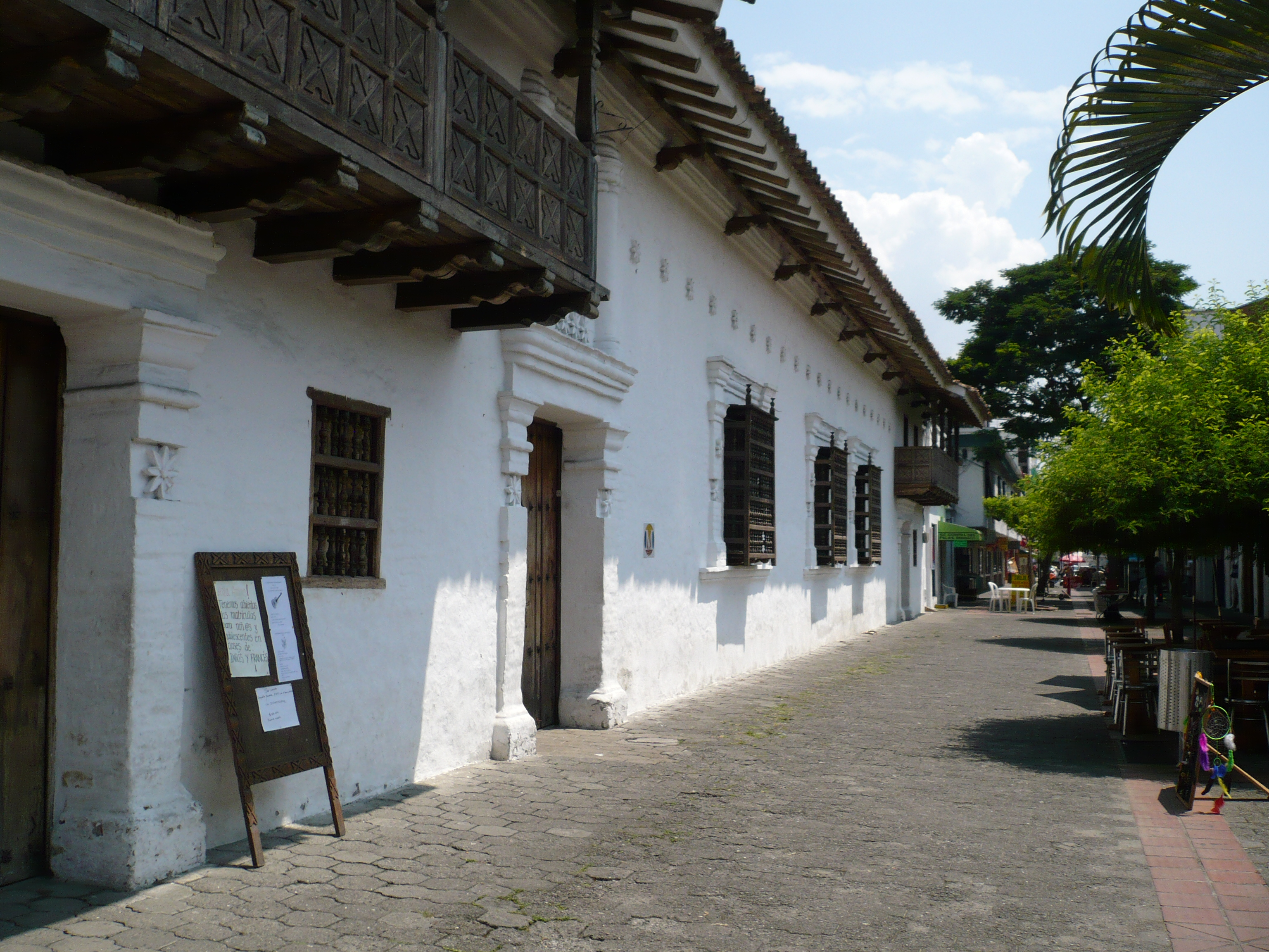 Casa del Virrey. Cartago, Valle, Colombia.